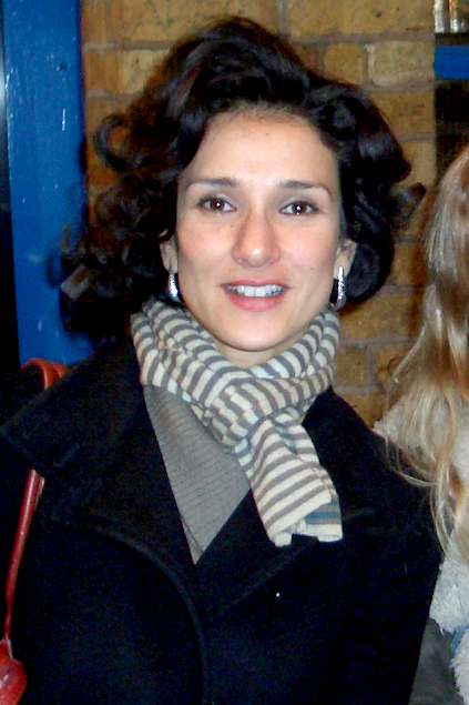 me + indira varma, 06/01/09, twelfth night @ wyndham